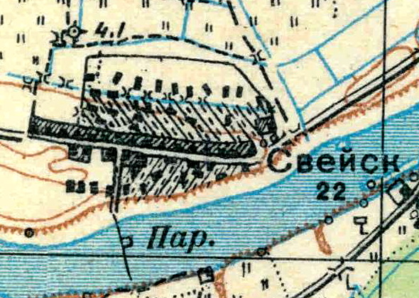 Топографическая карта Ленинградской области, квадрат О-35-21-Г-б (Калмотка), деревня Свейск.